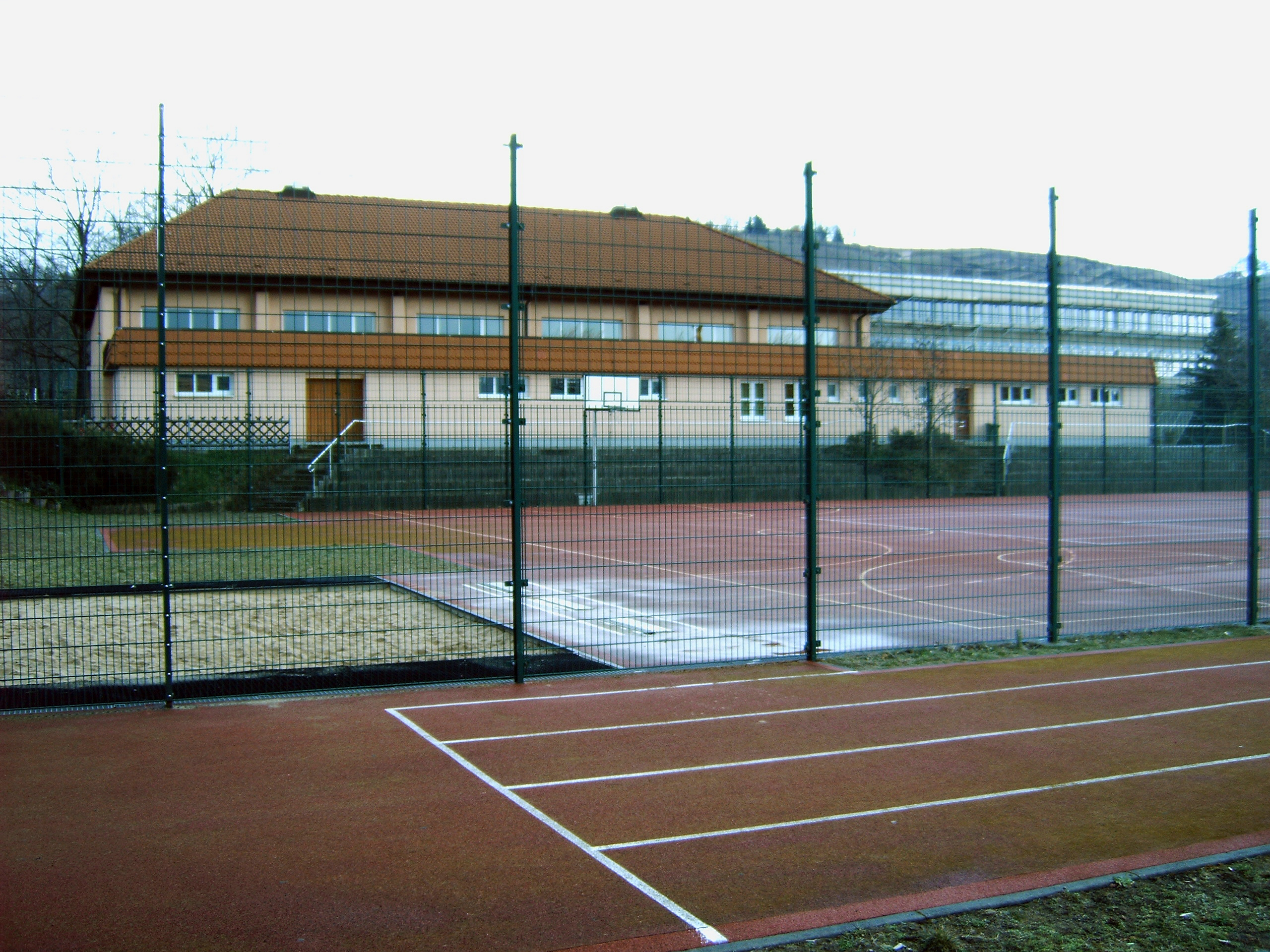 Im Vordergrund der Sportplatz des Gymnasium Luisenstift in Radebeul. Dahinter sieht man die neue Sporthalle, die auch für die Nutzung durch Vereine offen steht. Im Hintergrund rechts befindet sich das Weinberghaus (wurde zur Zeit renoviert.)